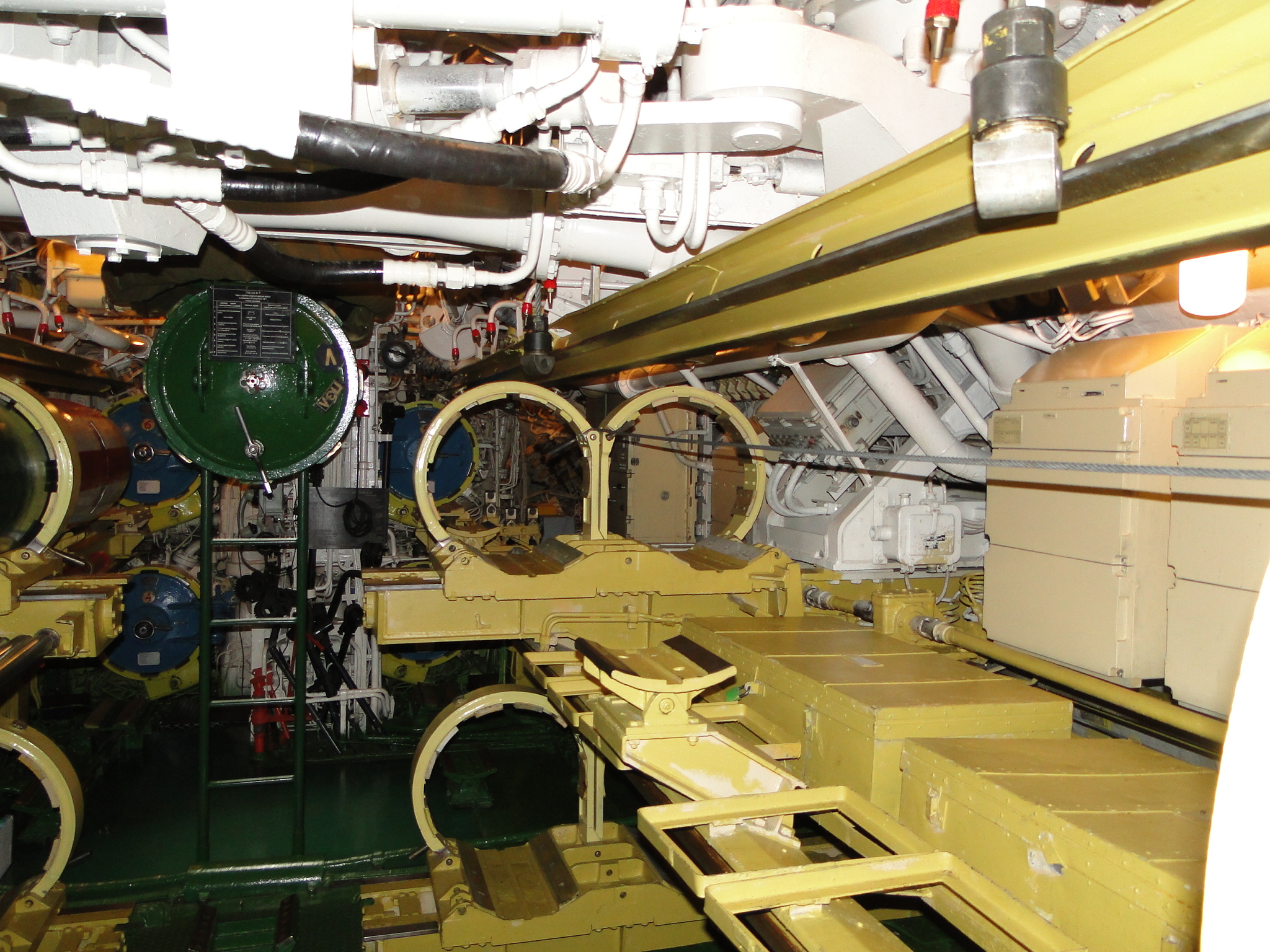 ORP Orzeł (1986) - wnętrze: przedział torpedowy